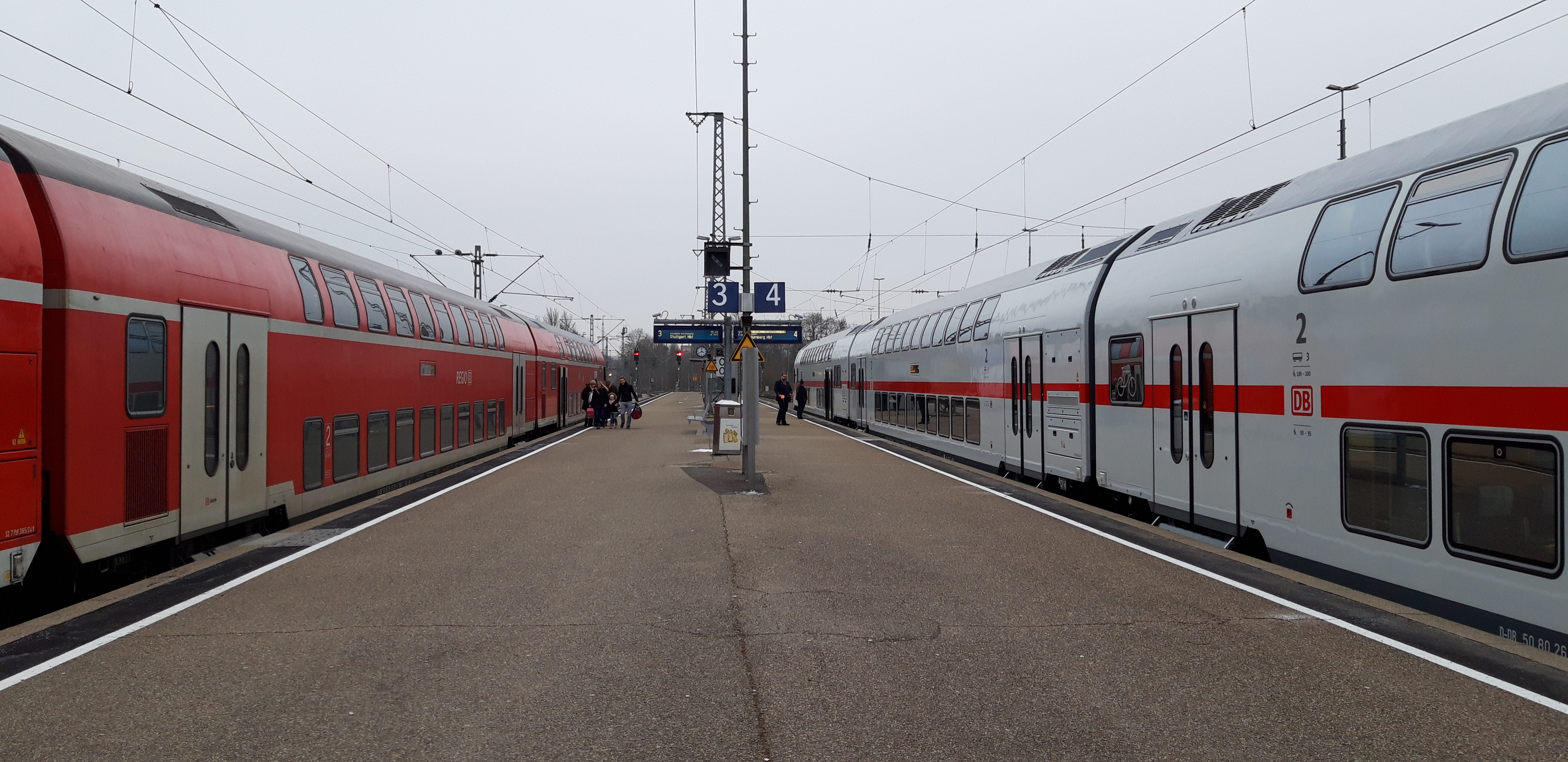 RE Dosto (Baujahr 1997) neben IC Dosto (Baujahr 2017) in Crailsheim